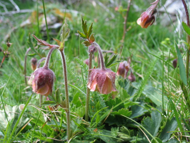 Geum rivale, Poladura de la Tercia, León, Spain